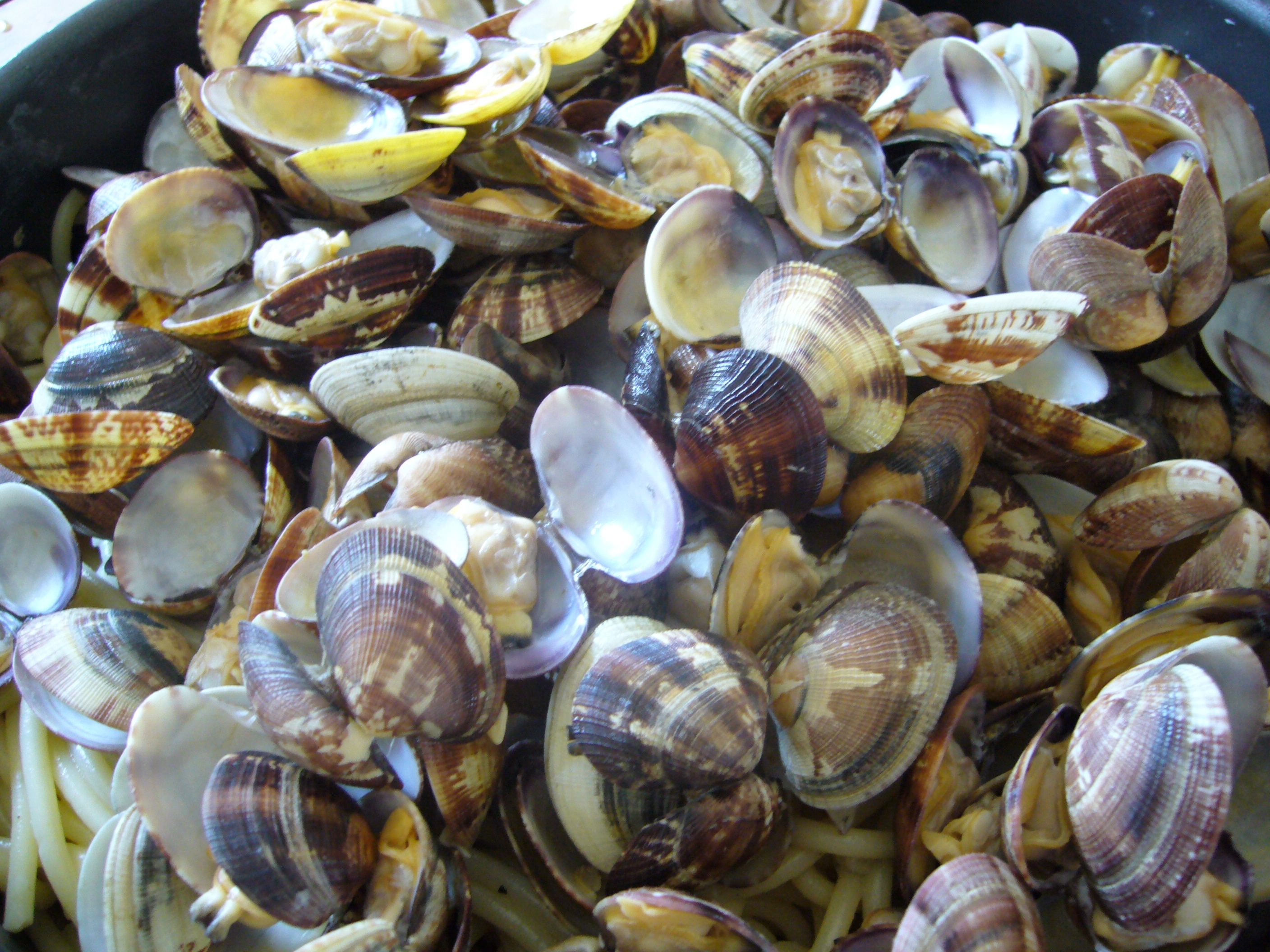 Pasta con le vongole